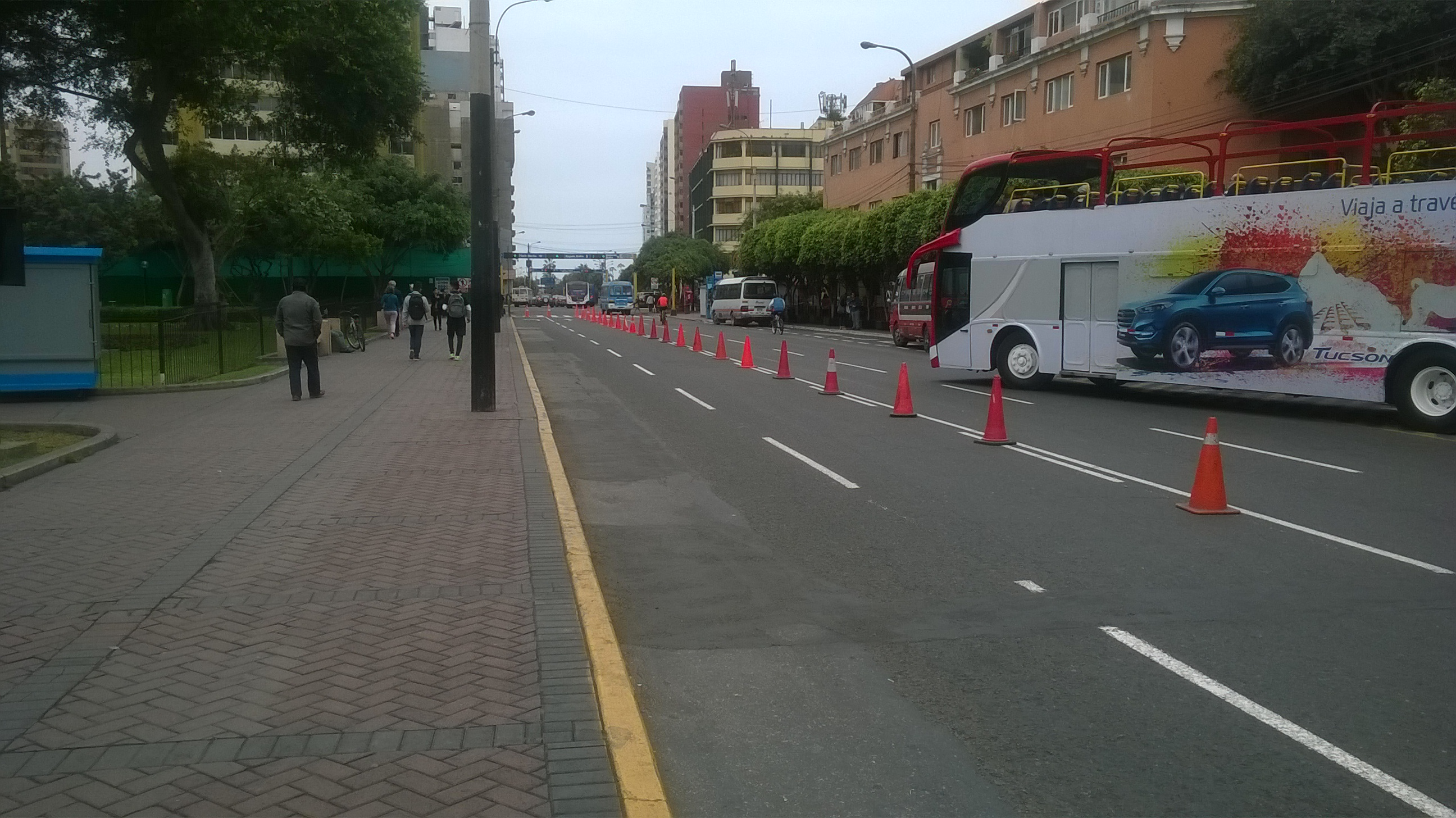 La avenida Diagonal en el distrito de Miraflores.